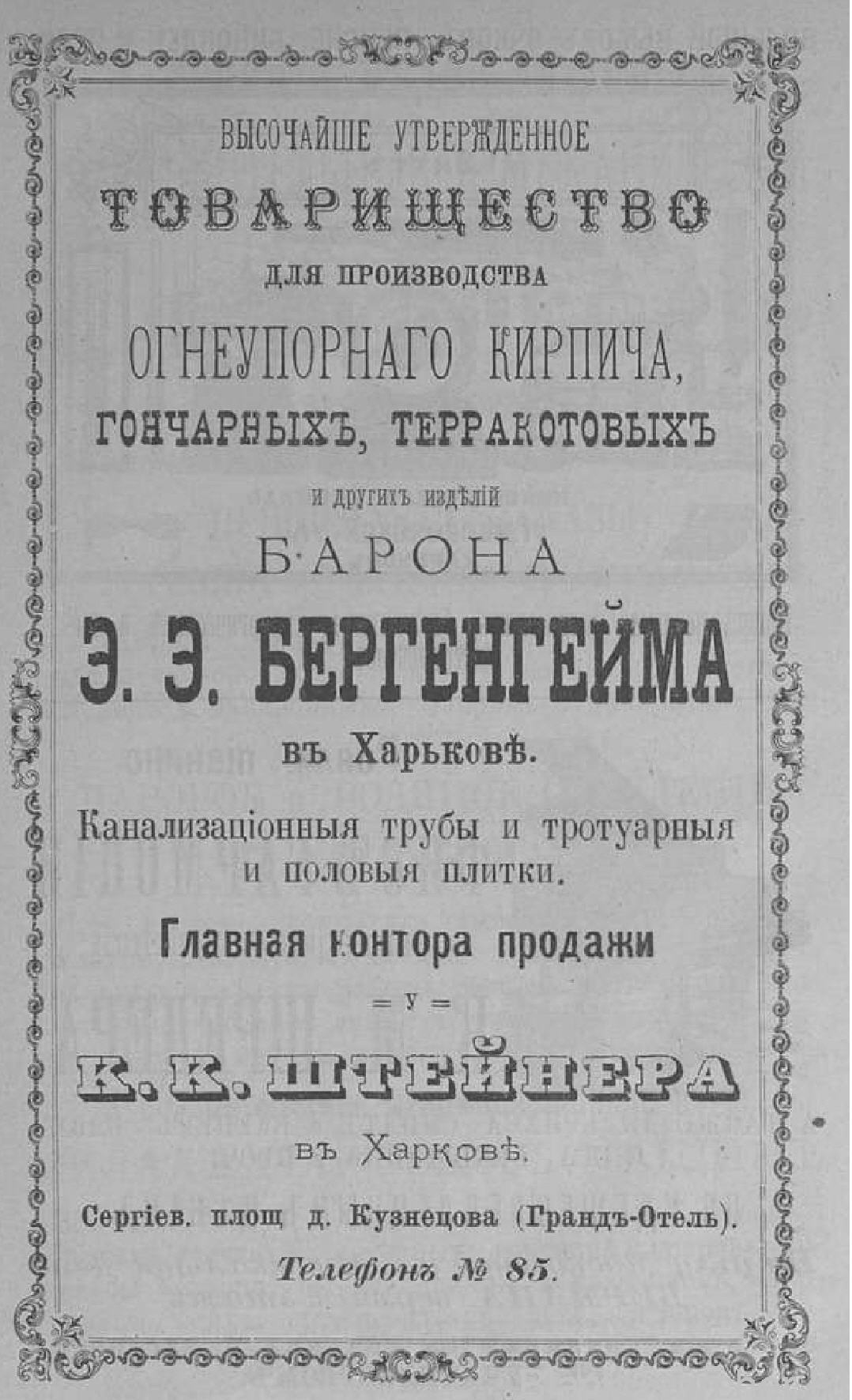 Реклама підприємства Бергенгейма. З Харківського календарю. 1892 рік.